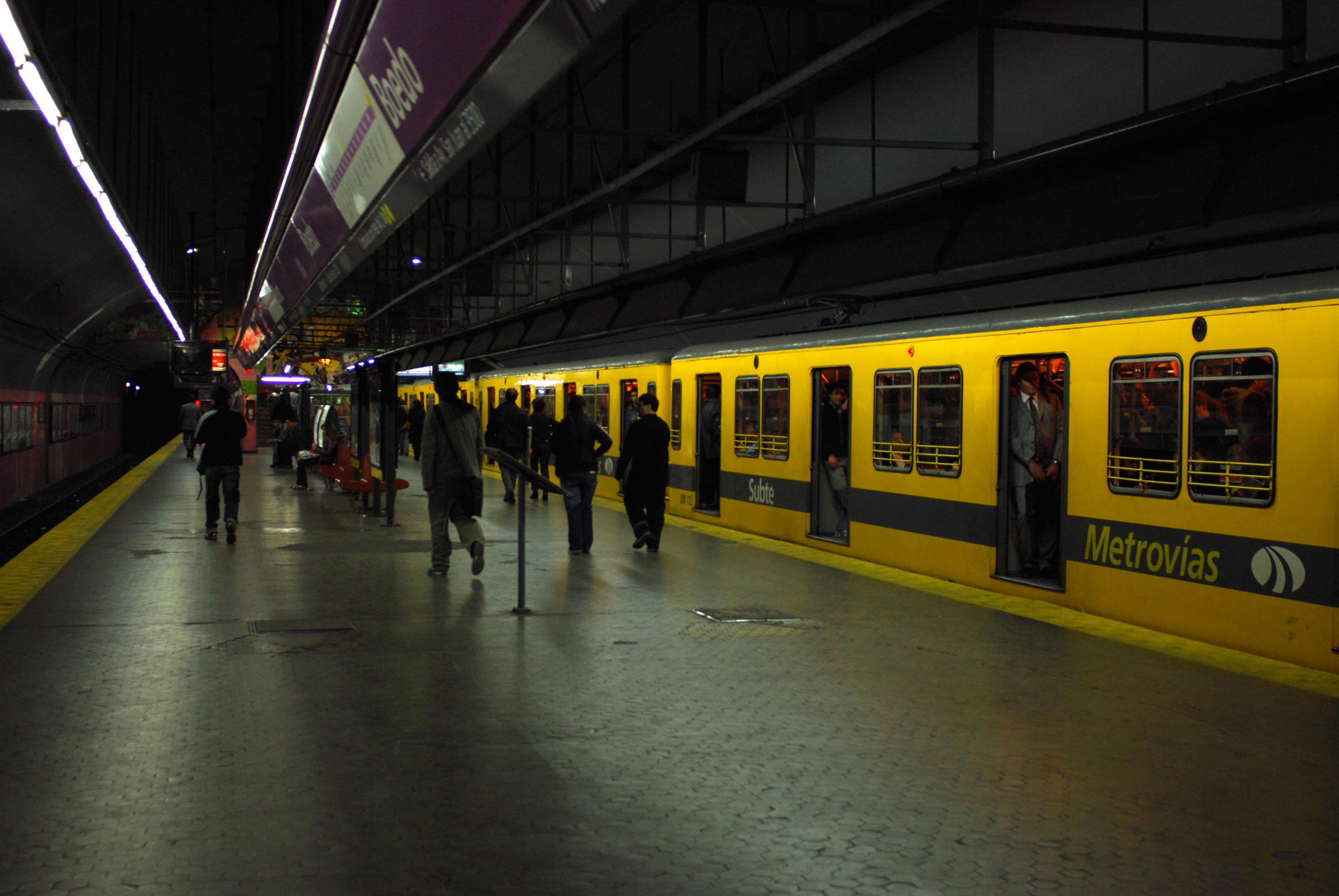 personas descendiendo del subte en la estación Boedo de la línea E en Buenos Aires, Argentina.